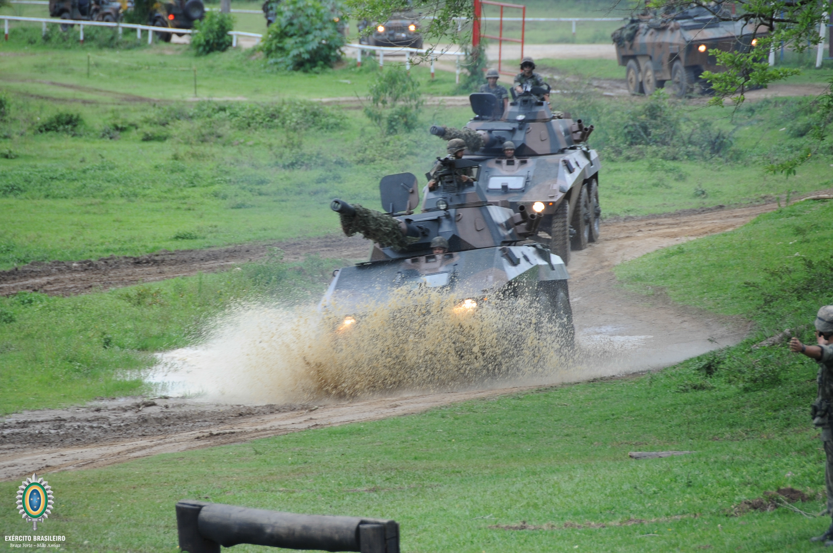 Cavalaria